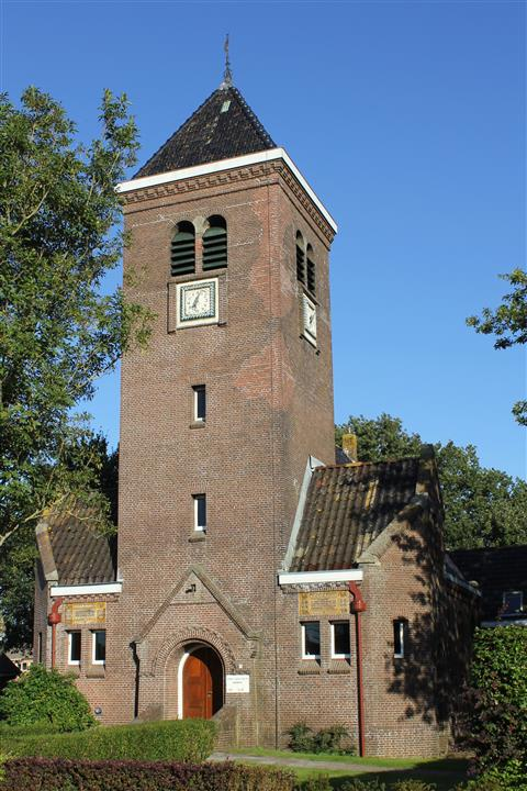 Kerk van Scharsterbrug